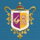 es el escudo de la ciudad de zamora